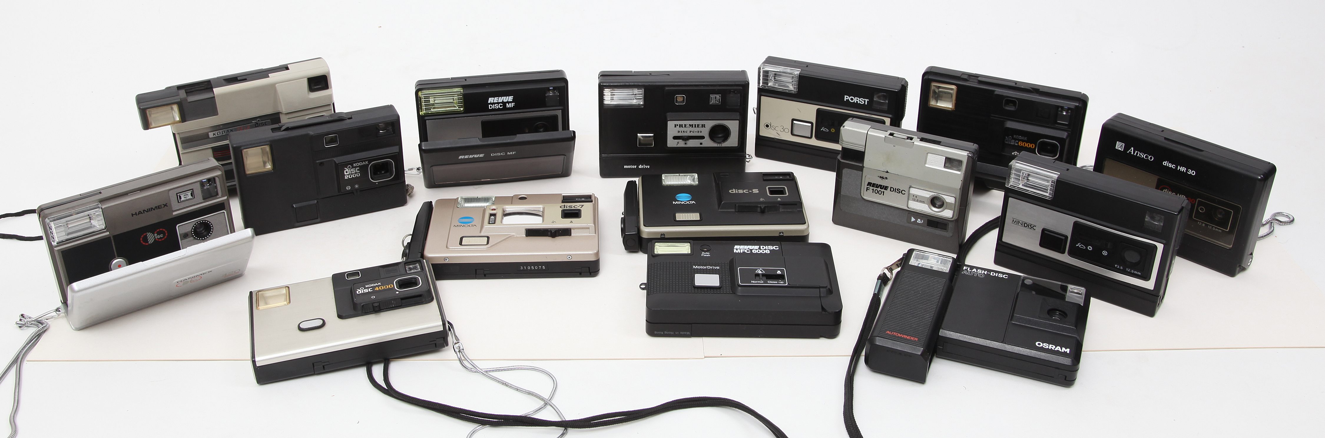 Verschiedene Disc-Kameras von diversen Herstellern